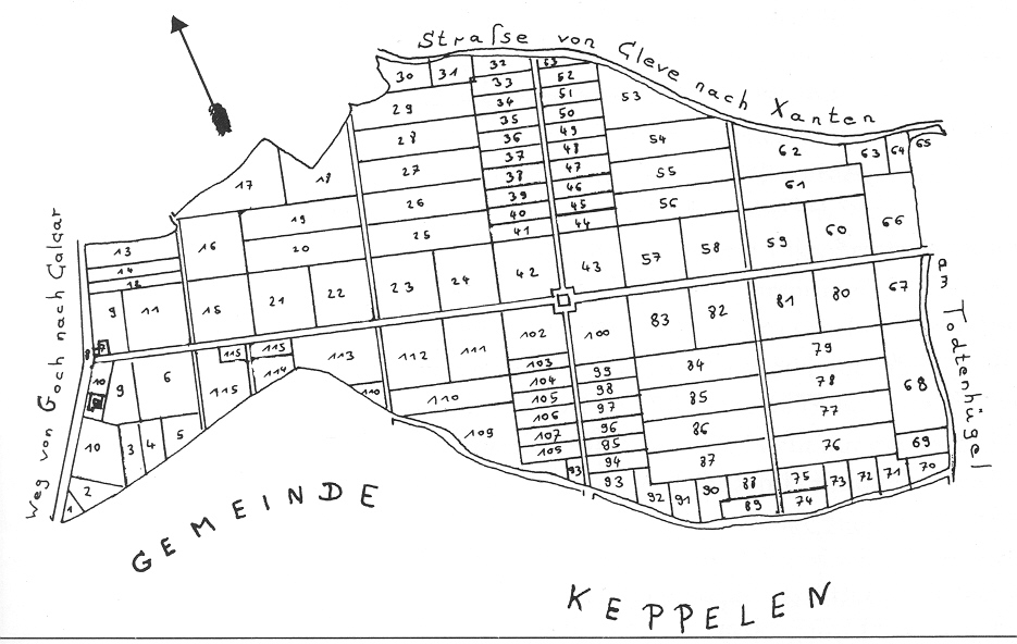 Grundriss der Gemeinde Neulouisendorf - Map of Neulouisendorf, Germany